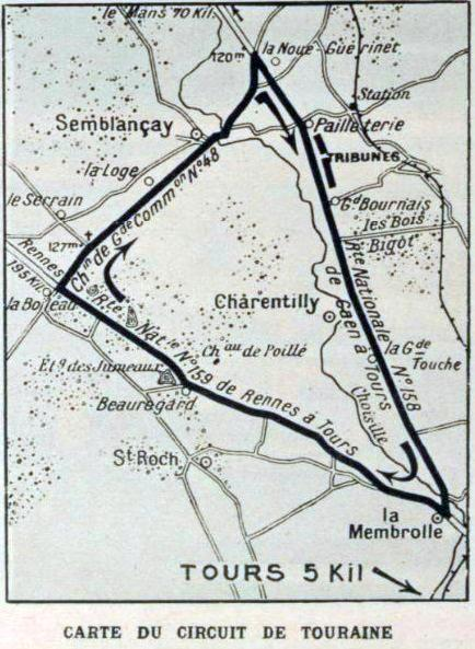 Carte du circuit de Touraine (Grand Prix de l'A.C.F. 1923)